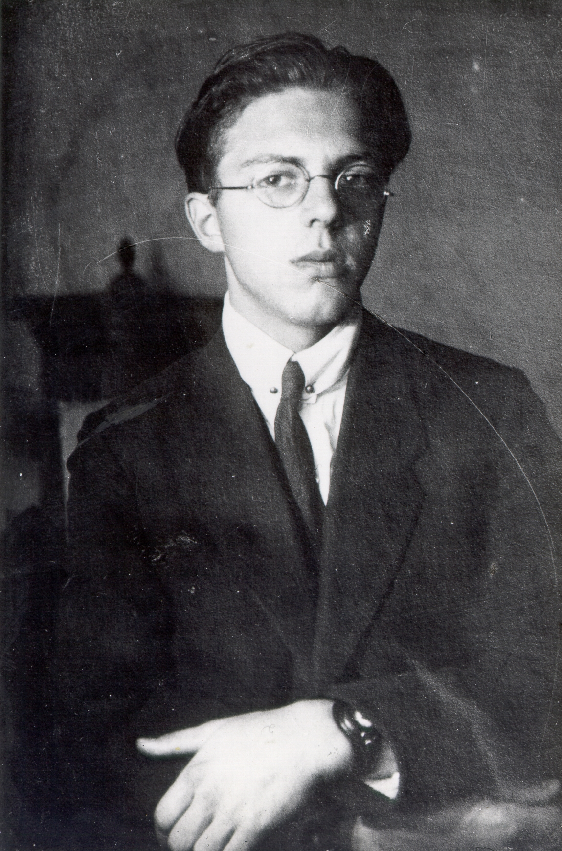 Srečko Kosovel (1904-1926)